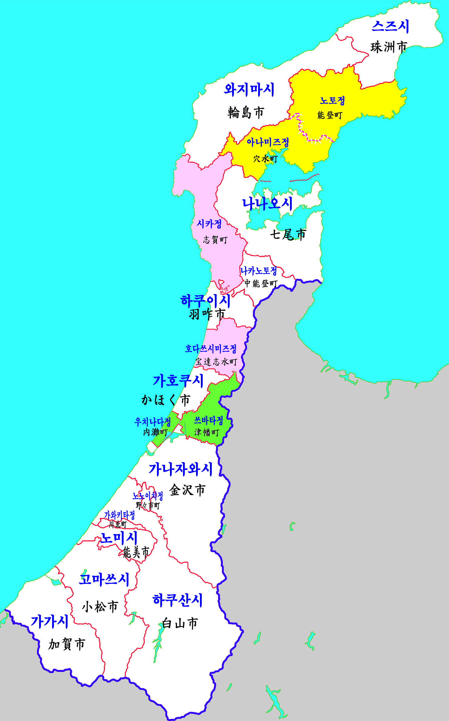 이시카와현 행정구역